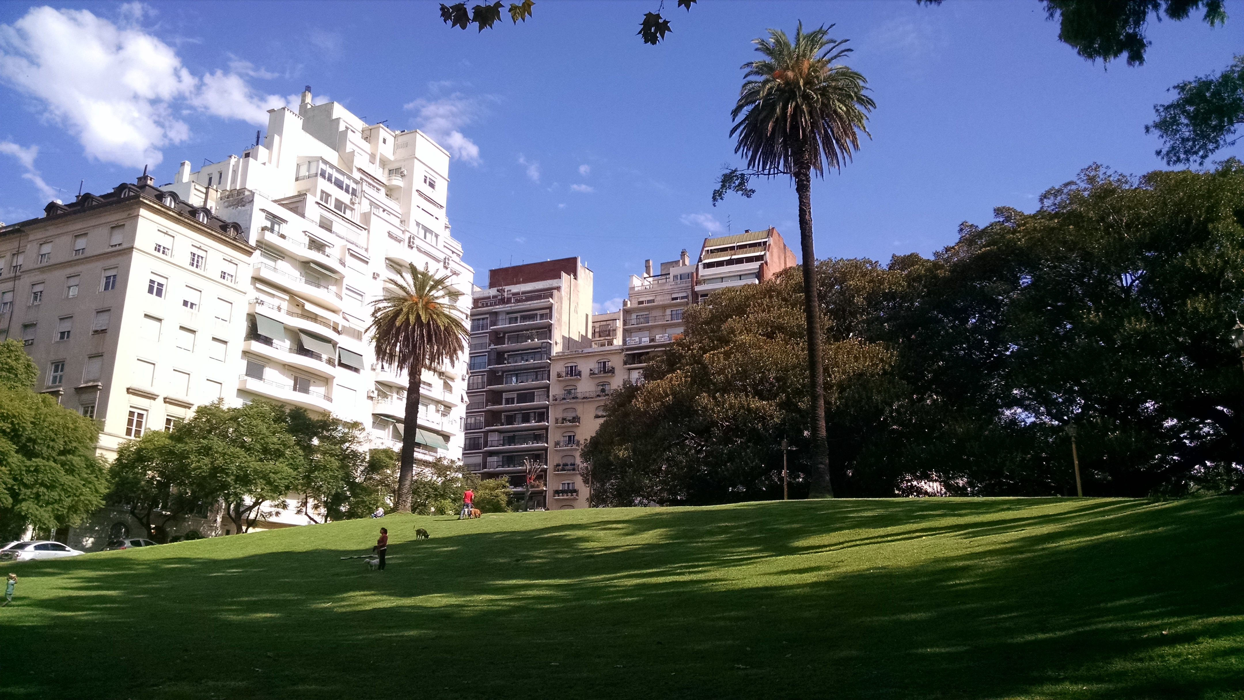 Vista de la barranca de la Plaza San Martín de Tours, tomada desde la calle Posadas entre Adolfo Bioy Casares (ex Schiaffino) y la bajada de la Avenida Alvear, mirando hacia la misma. La ondulación es parte de la barranca natural del Río de la Plata.